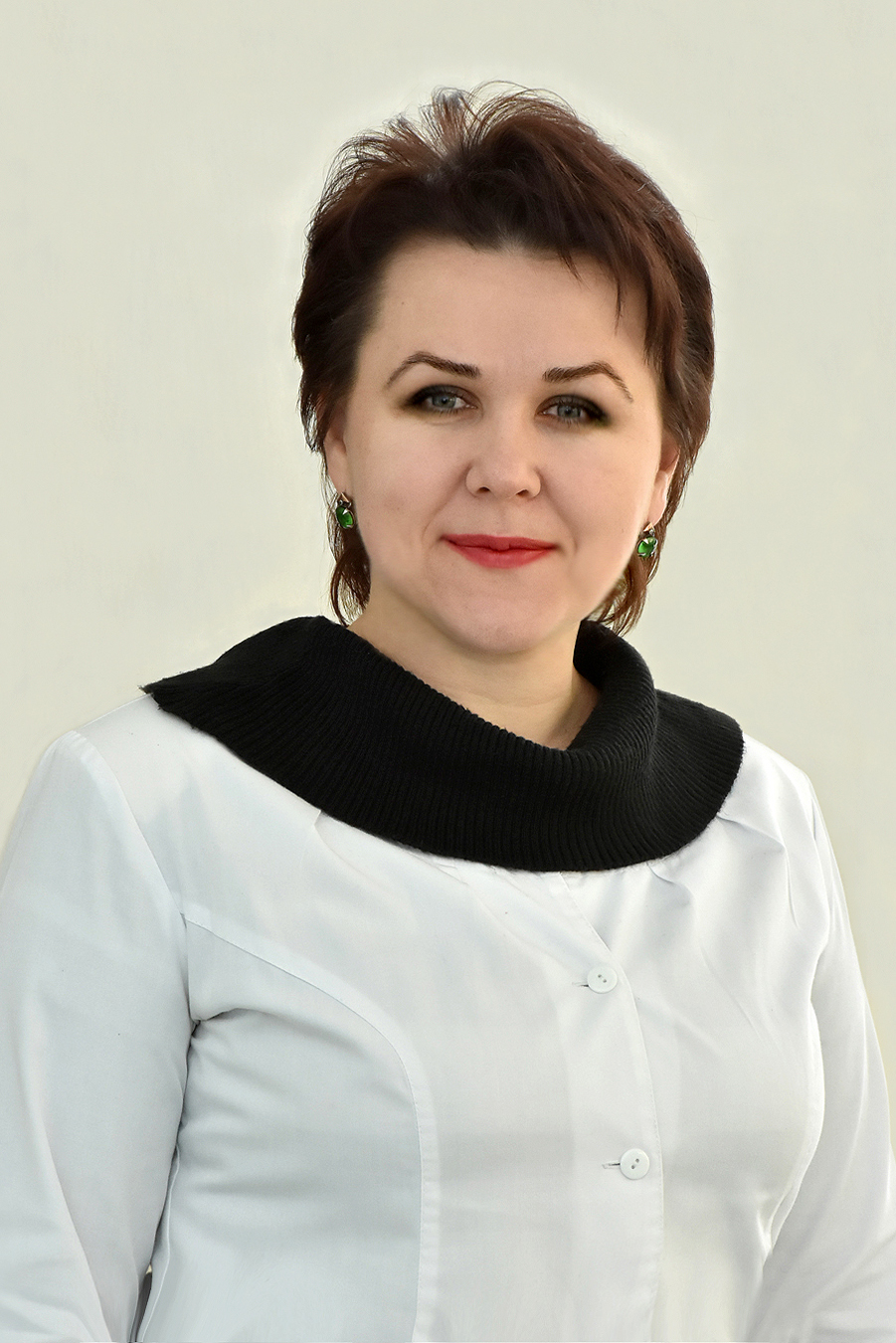 Українська вчена, доктор біологічних наук, доцент Тернопільського державного медичного університету імені І. Я. Горбачевського Зоя Небесна.